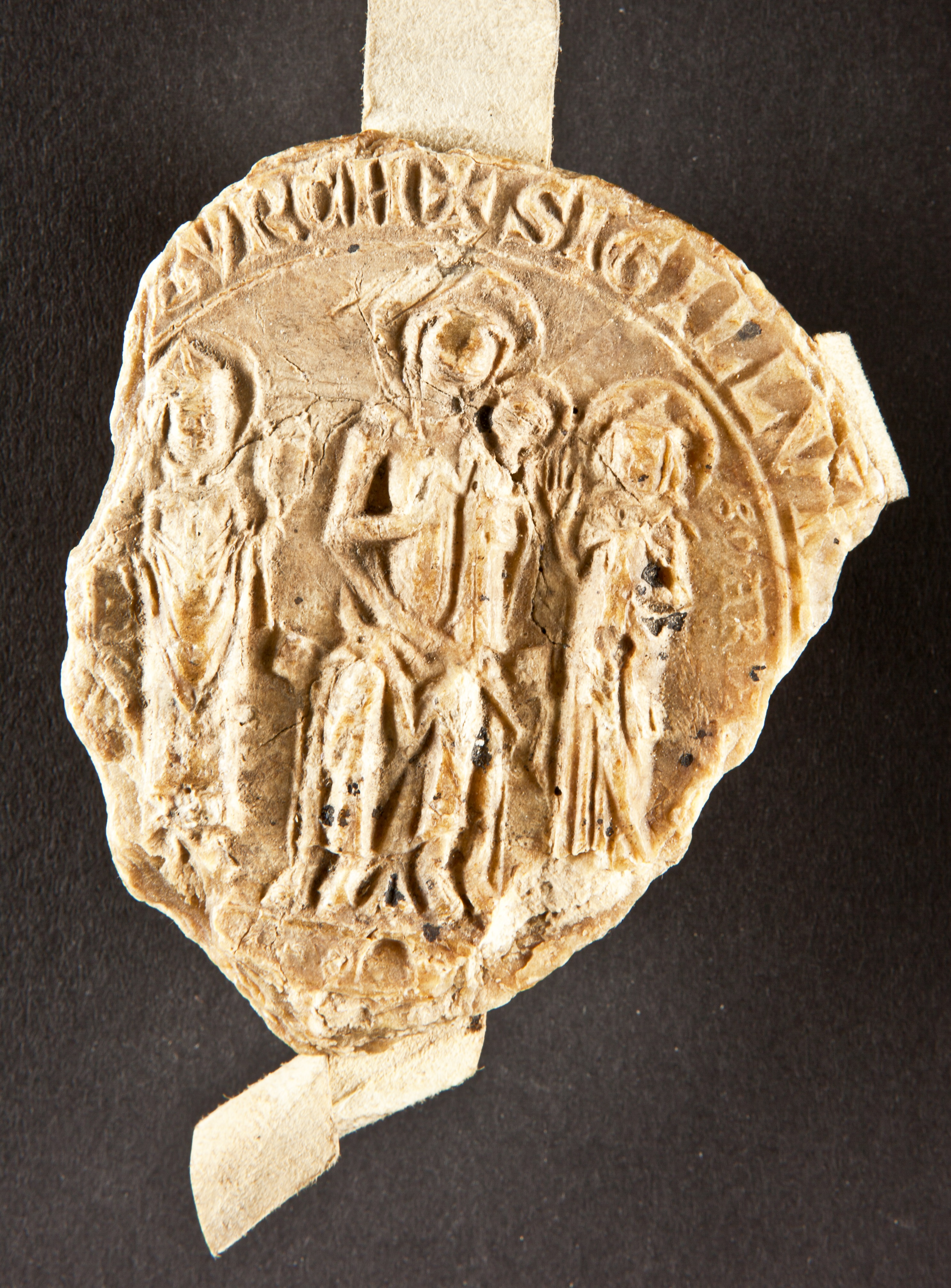 Konventsiegel des Klosters Huysburg (rund, 78 mm, beschädigt), anhängend an einer Urkunde vom 6. Oktober 1400. Bischof Ernst von Halberstadt übereignet dem Kloster Huysburg unter Abt Jasper (Edler von Berwynkel) einen Hof auf der Vogtei in Halberstadt (der sog. Abtshof), den der Knappe Johann von Dorstadt dem Bischof aufgelassen hat. – Es handelte sich um einen großen Hof (13–14 Häuser) und zwei anliegende Häuser neben der Gebhards-Straße. Bischof Ernst befreite außerdem Abtshof und Häuser von allen Vogteilasten. – Das Heiligensiegel zeigt die auf einem Thron sitzende Maria mit dem auf ihrem linken Schenkel stehende Kind. An ihrer Seite begleiten sie zur Linken die hl. Maria Magdalena und zu ihrer Rechten der hl. Gregor. Mit der Umschrift: + SIGILLVM•SANCT[E• MARIE]•VIRGINIS•IN HV[Y]SBVRCH.